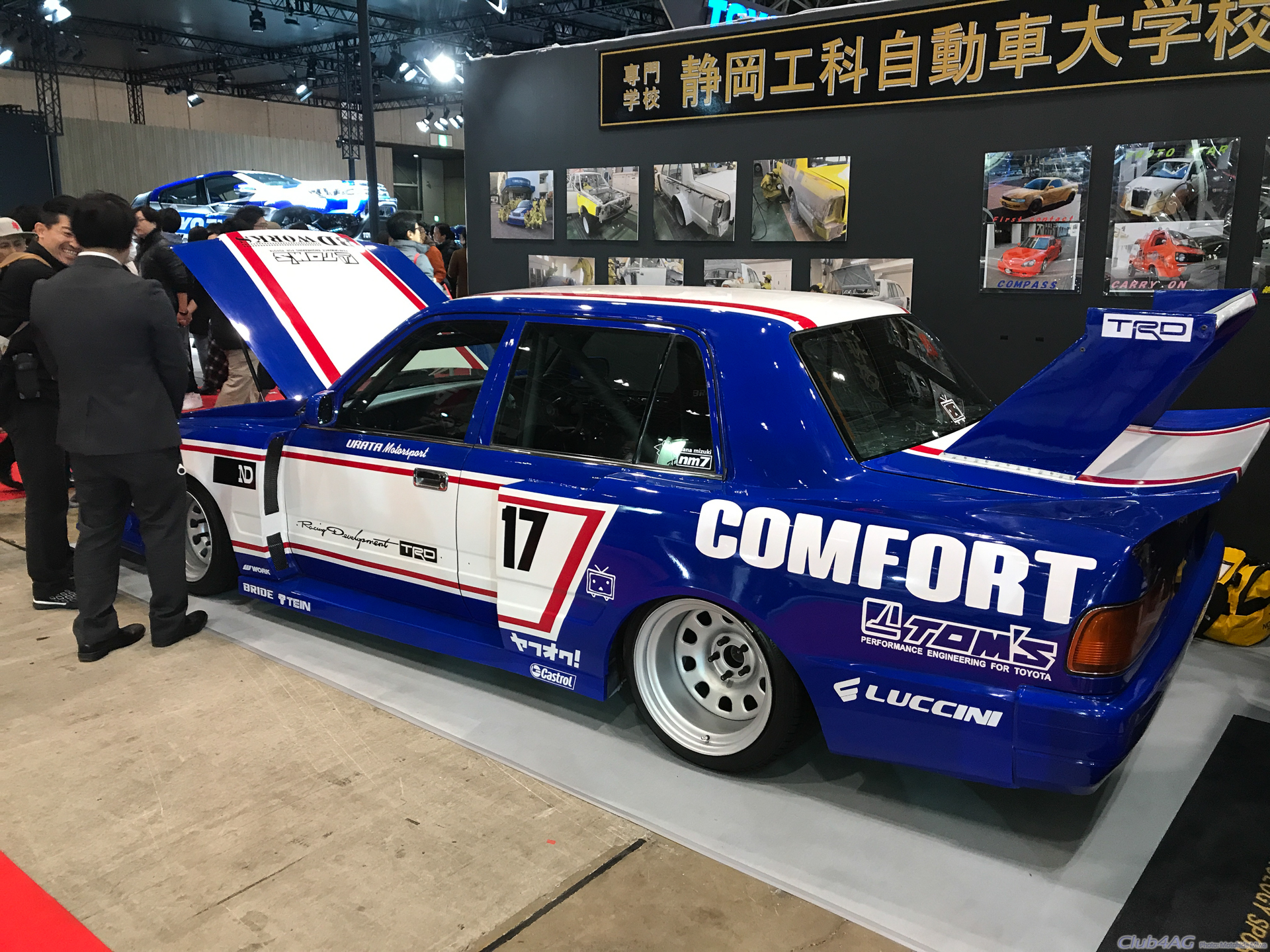 Tokyo Auto Salon 2019